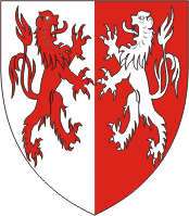 Wappen vom Bezirk Visp, Wallis, Schweiz